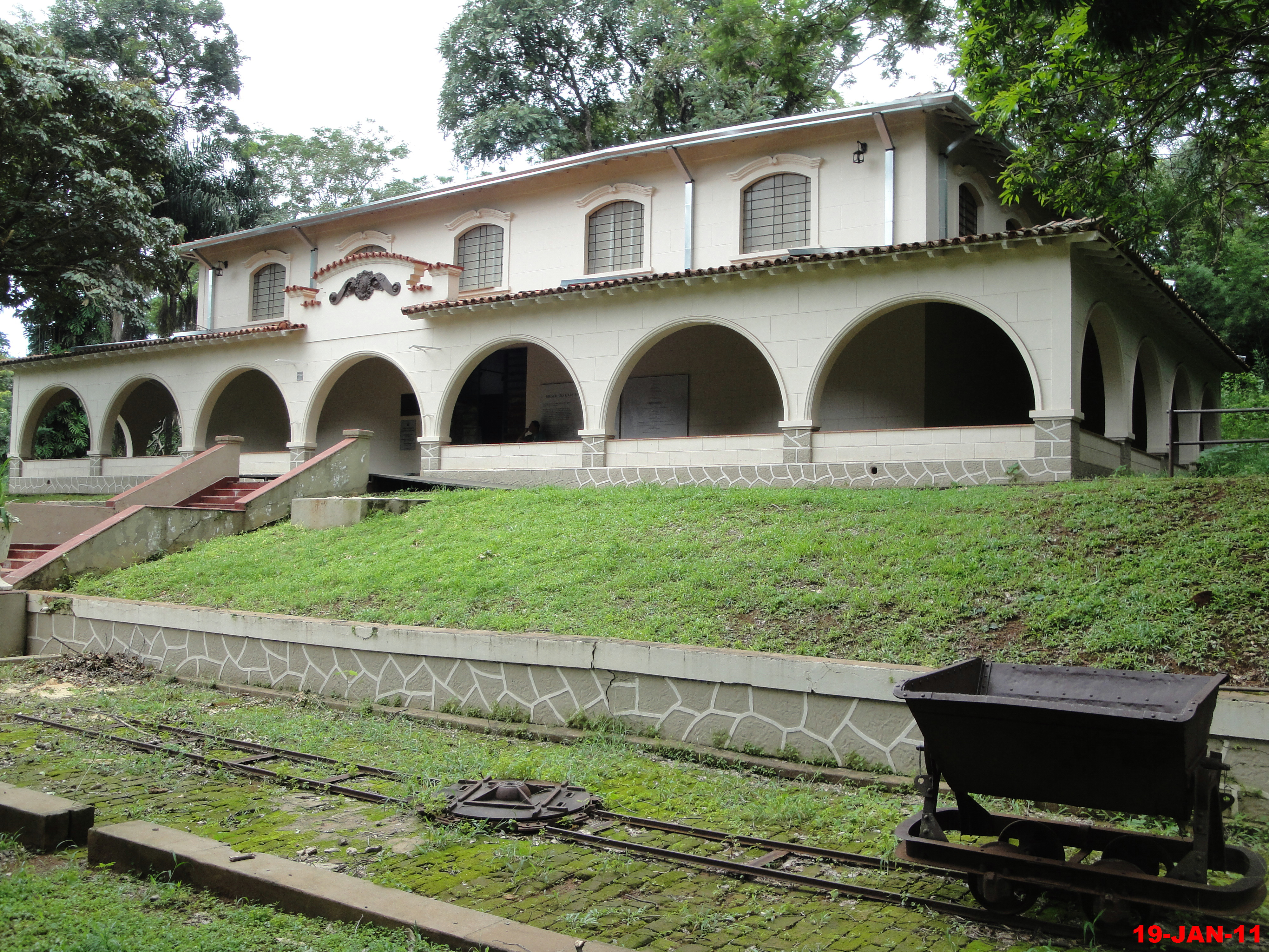 Museu do Café em Ribeirão Preto / Museum of Coffee in Ribeirão Preto